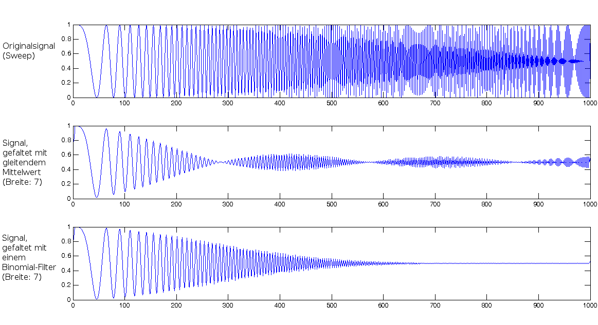 Frequenzsweep bis zur Nyquist-Frequenz und per gleitendem Mittelwert gefaltete Signalvarianten (einmal ungewichtet, einmal binomial)